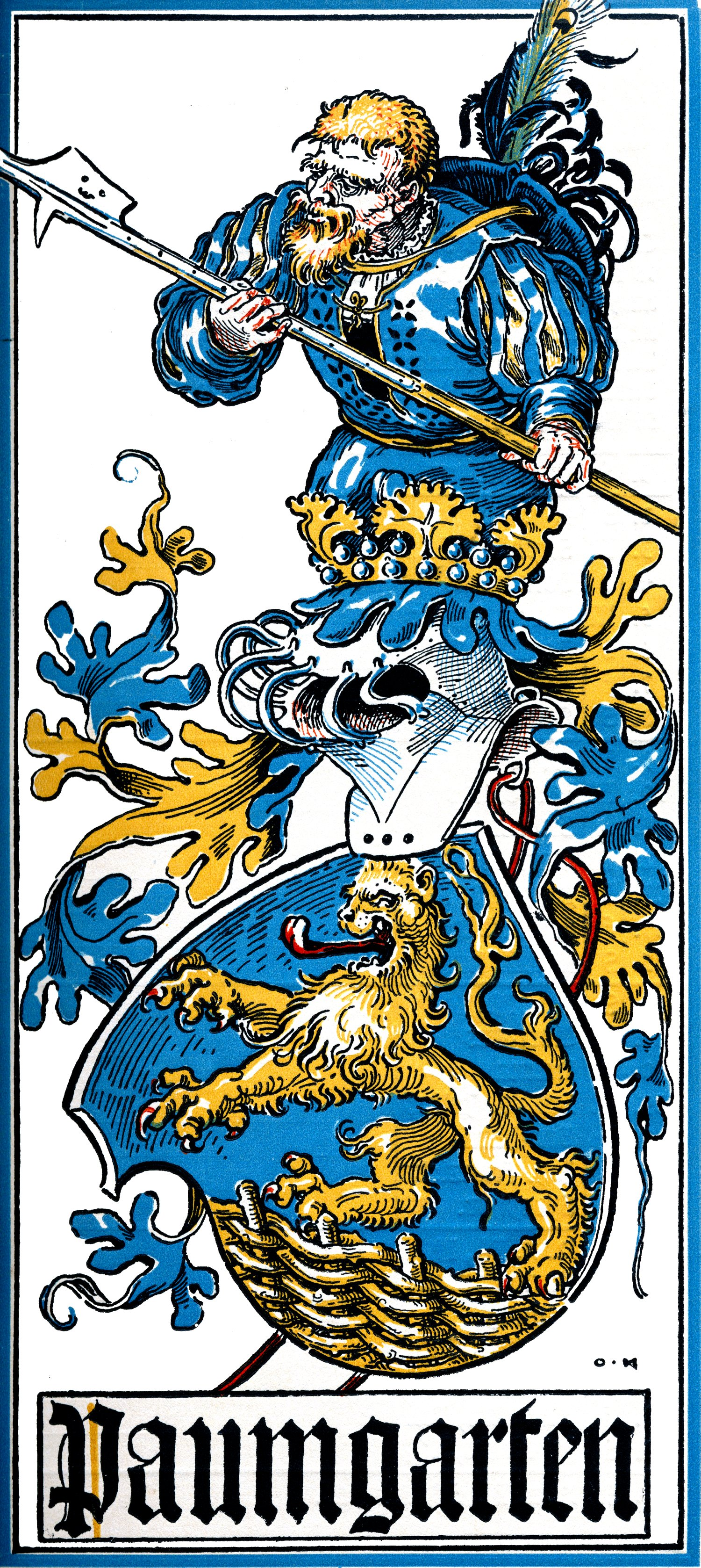 Wappen derer von Paumgarten